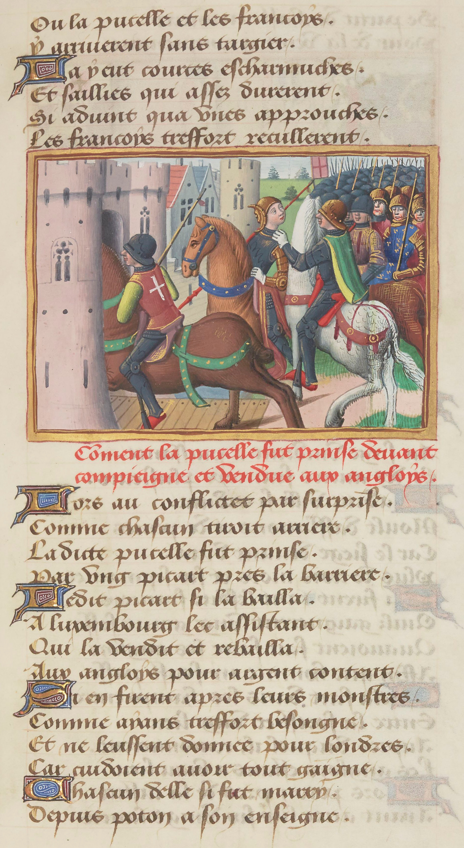 La capture de Jeanne d'Arc par les Bourguignons lors du siège de Compiègne, le 14 mai 1430.